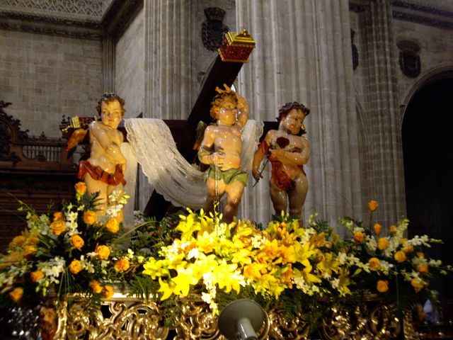 Paso de la Soledad de la Cruz, obra de Monzón y Cid en 1997. Hermandad de Ntra. Sra. de la Soledad (Salamanca)